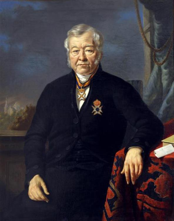 burgemeester 's-Hertogenbosch